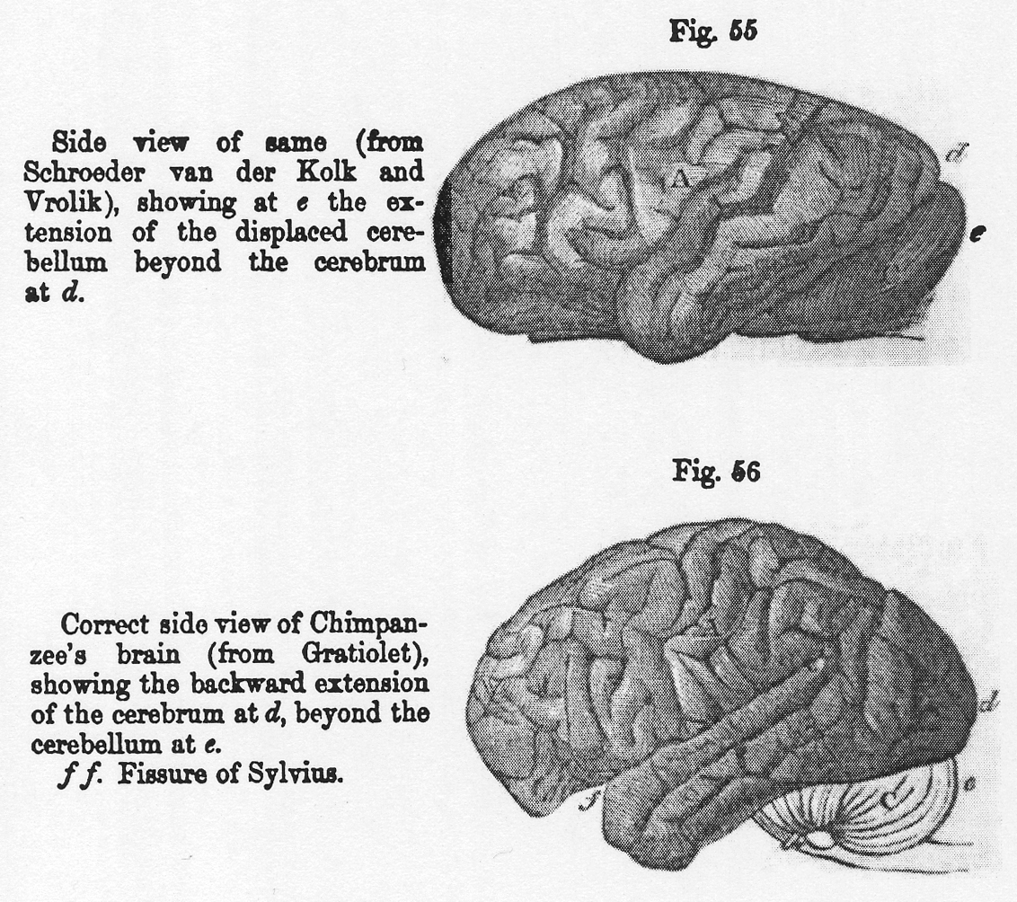 Seitenansicht eines deformierten und eines normalen Schimpansengehirnes.